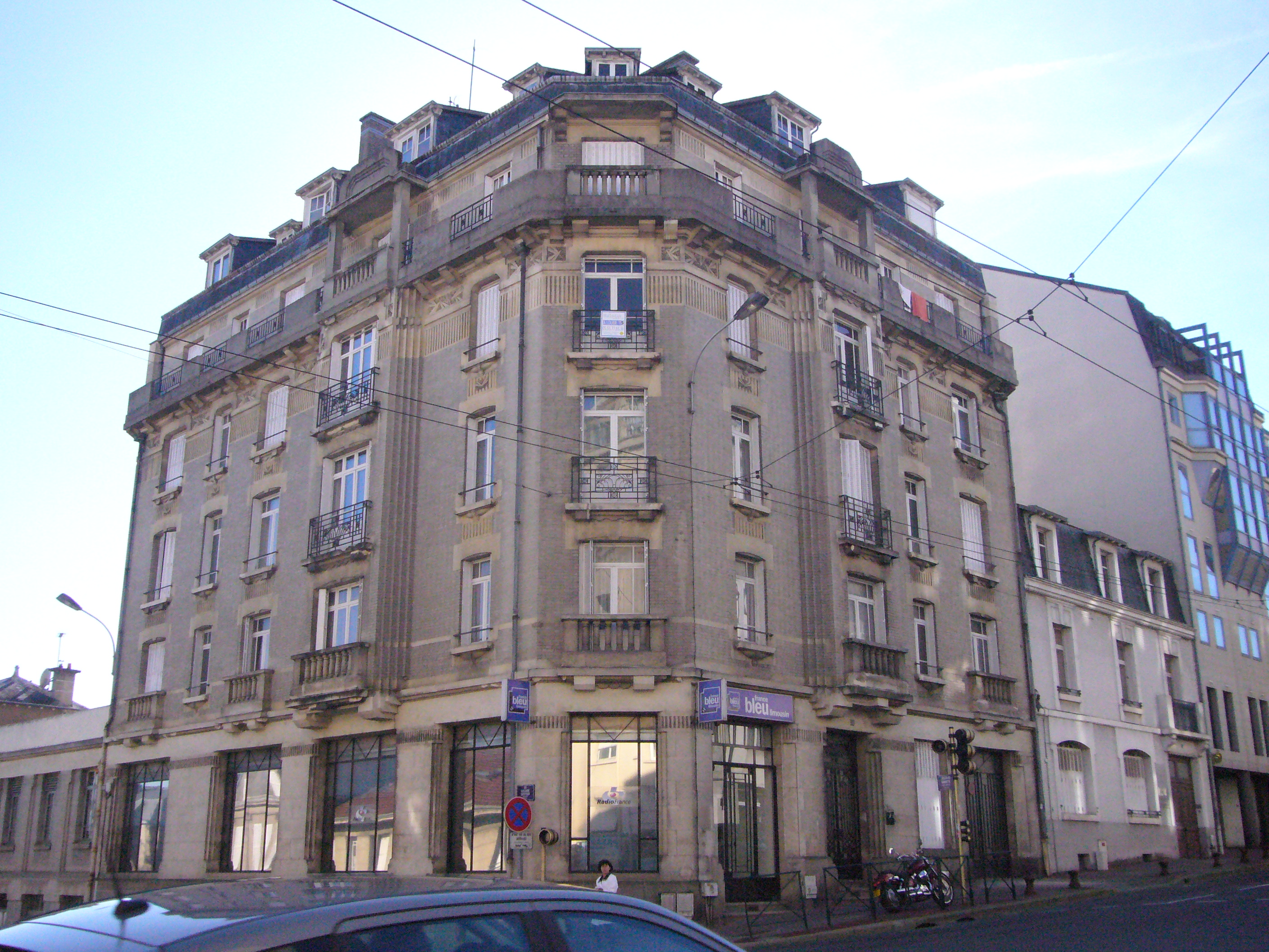 Siège de France Bleu Limousin, boulevard Gambetta à Limoges (Haute-Vienne, France)